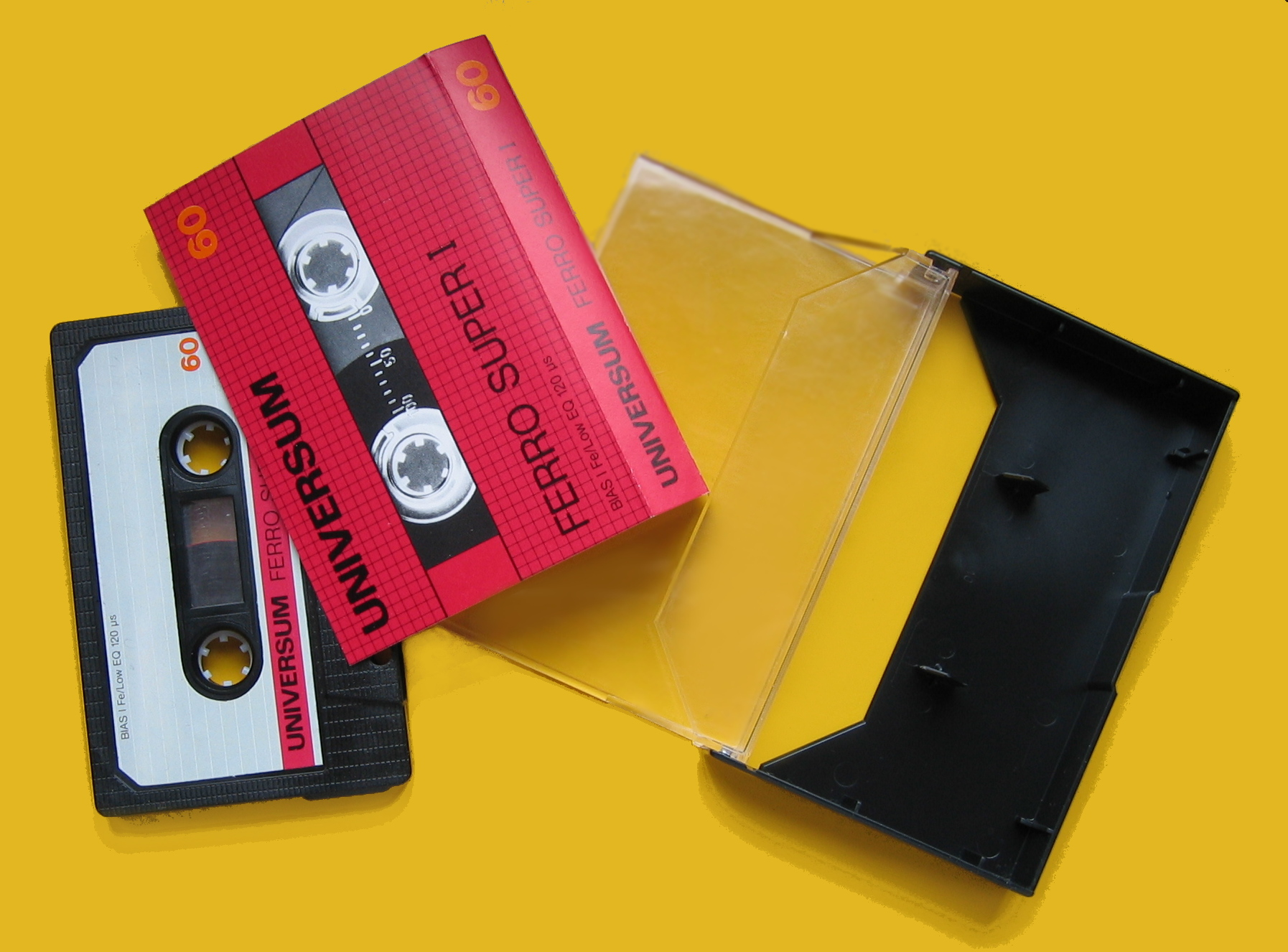 Compact Cassette UNIVERSUM C60